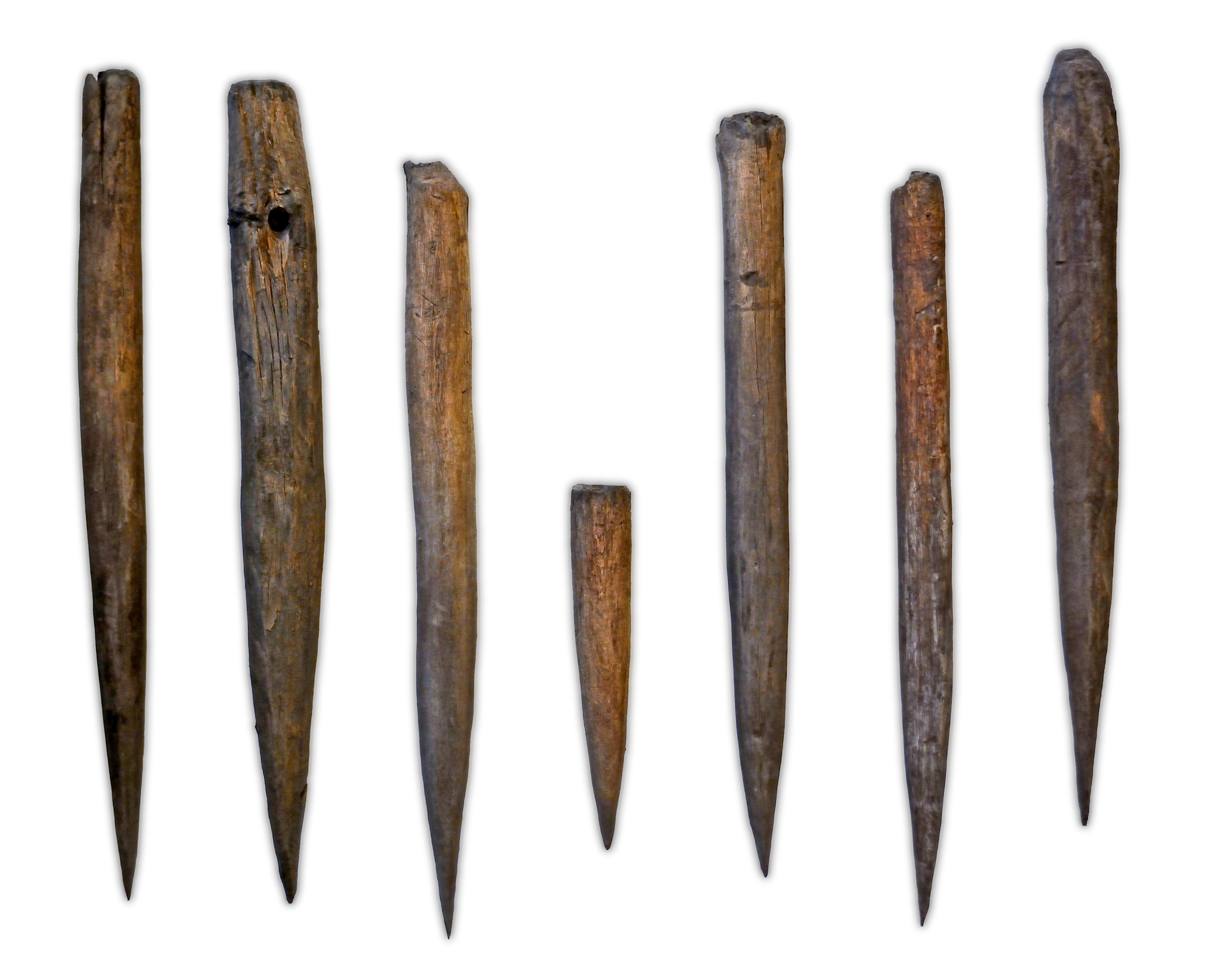 Impressionen aus dem LVR-Archäologischer Park Xanten Hier: Aufgefundene Gründungspfähle für das Fundament der Thermen